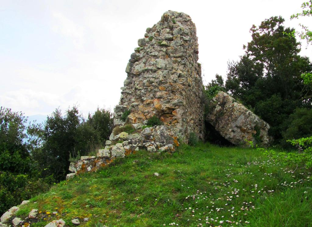 Resti della cinta muraria del villaggio fortificato di Montemarciale (isola d'Elba)